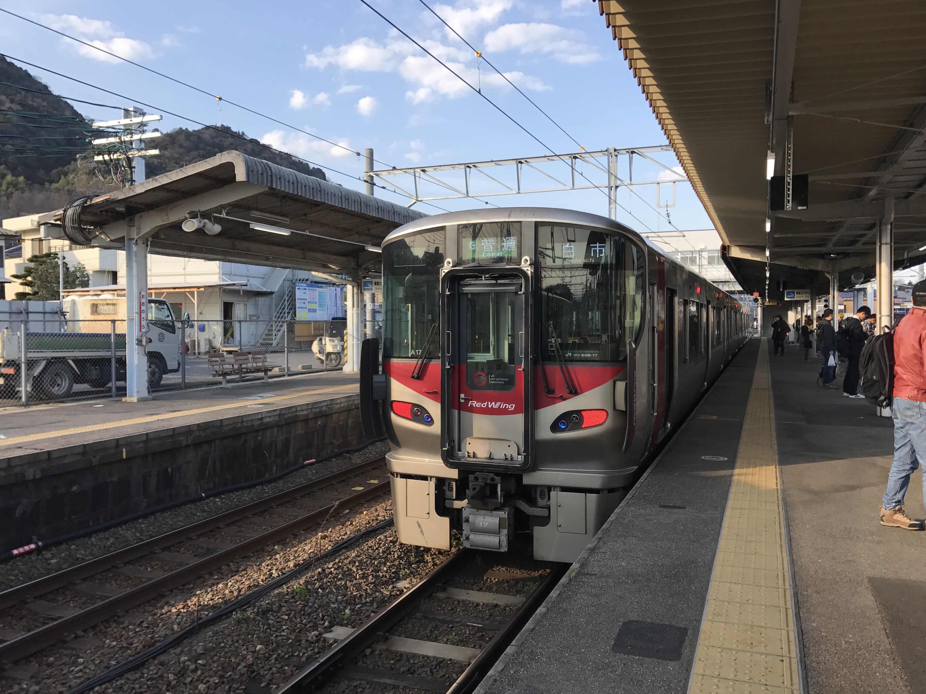 大野浦駅から発車する前の白市行き普通列車